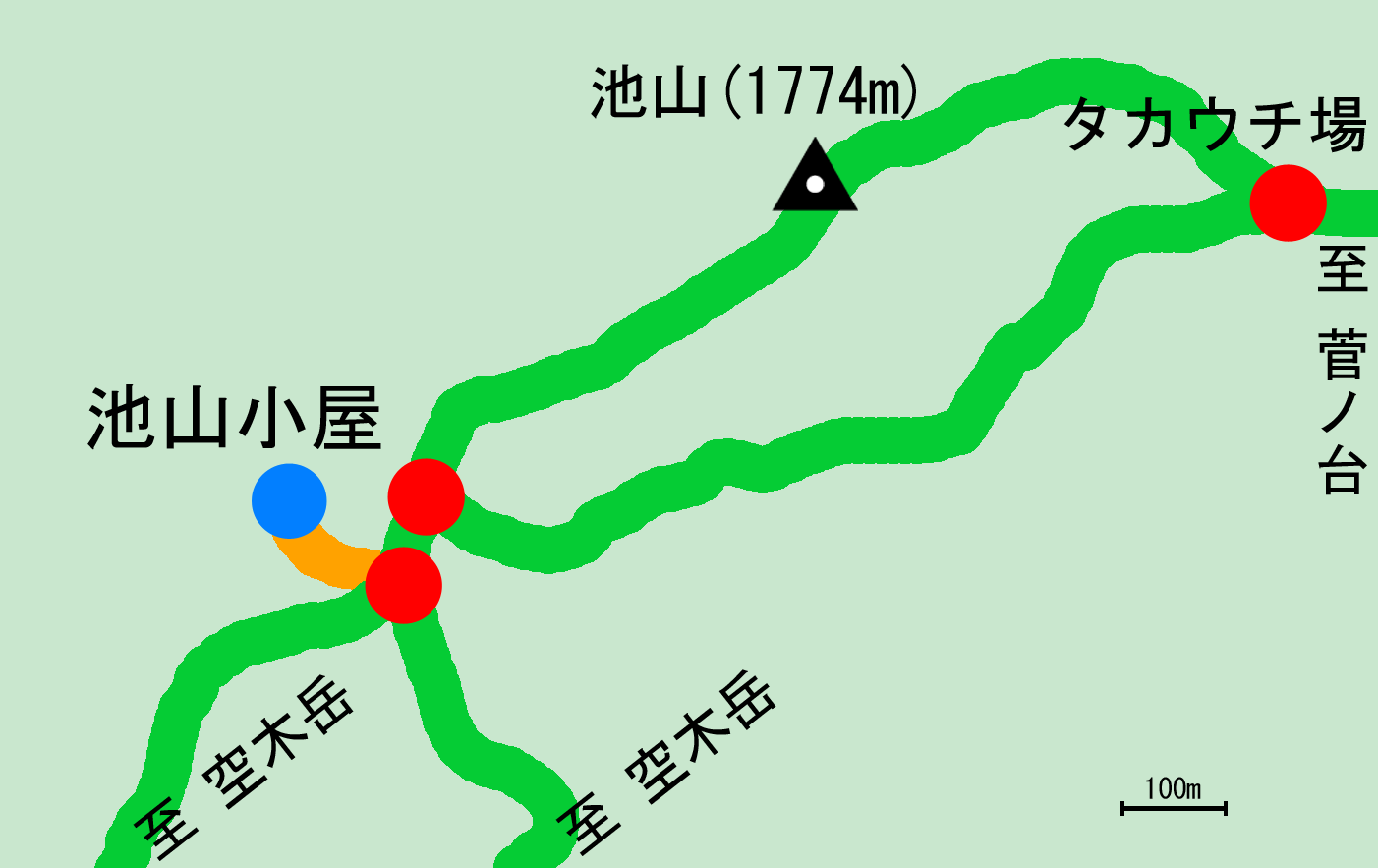 中央アルプス・池山周辺の地図